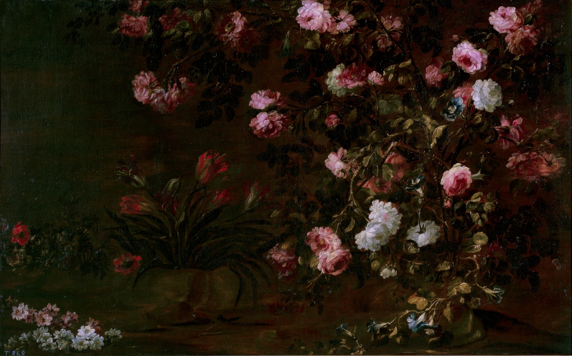 Margarita caffi, Rosal en Flor (finales del siglo XVII), Museo del Prado.